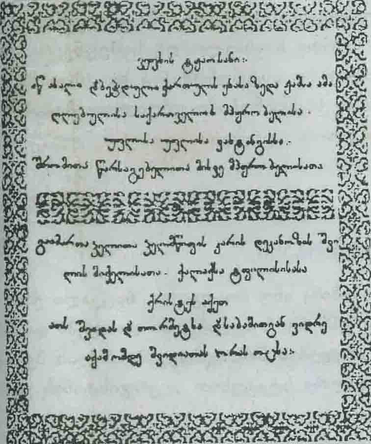 1712 წელს დაბეჭდილი ვეფხისტყაოსნოს თავფურცელი